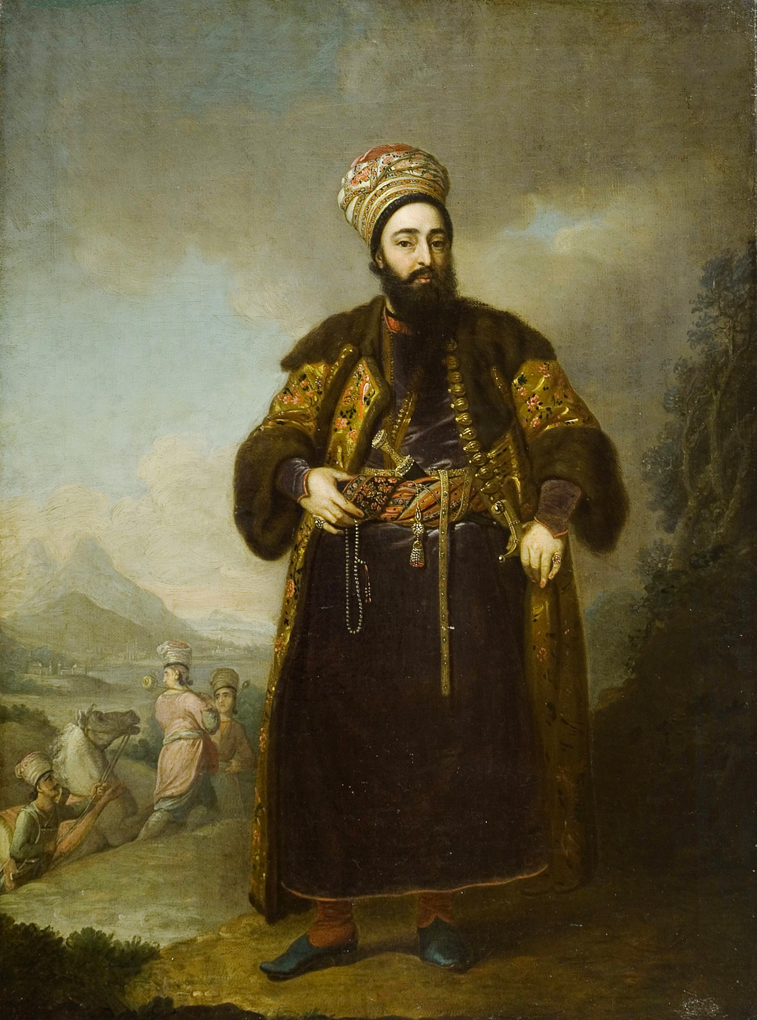 Муртаза Кули хан, сын хана астрабадск., Екатериною II поддерживаемый претендент на персидский престол, посланный с войсками Зубова 1796 г., † в Астрахани 1800 г.